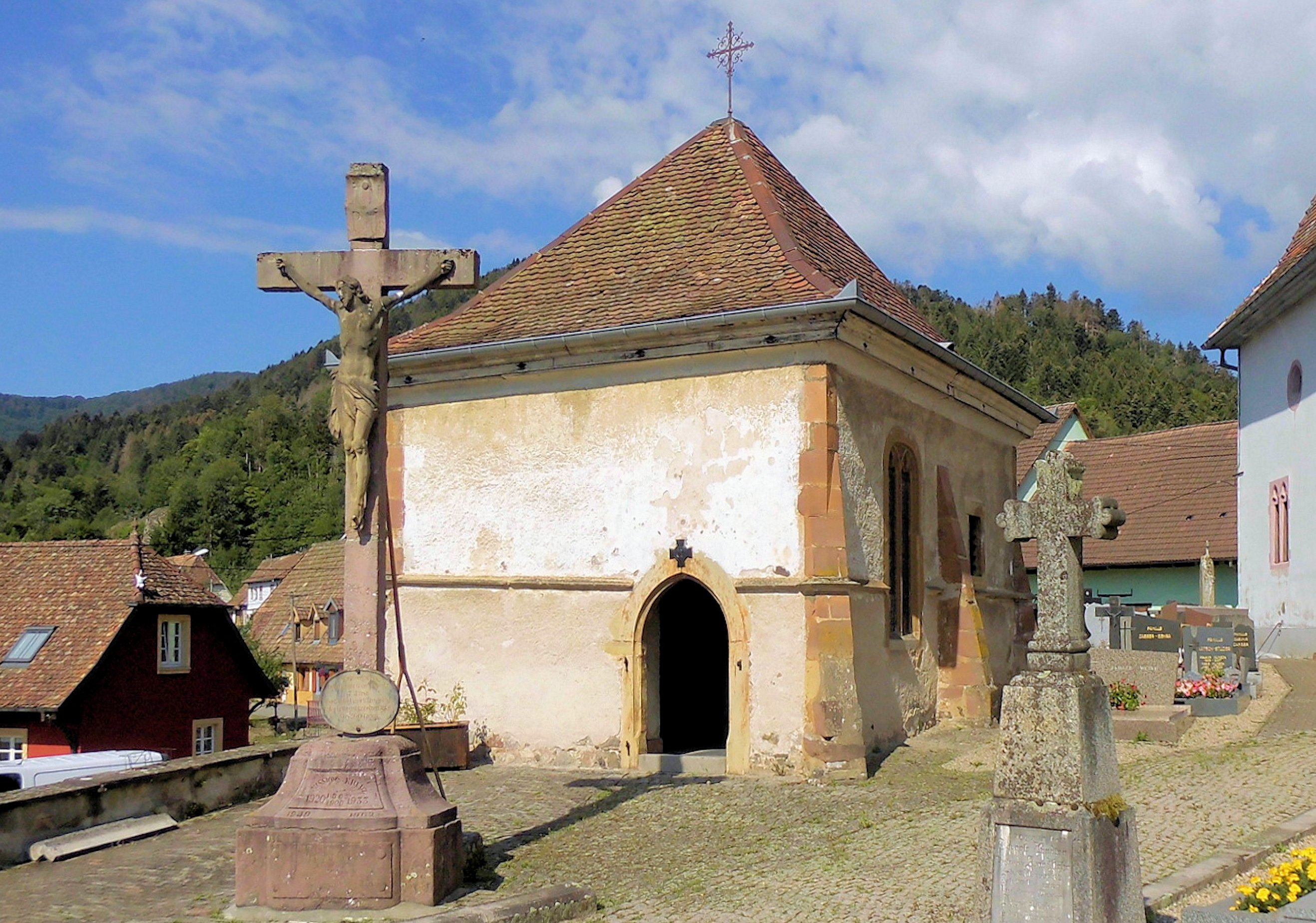 La chapelle du cimetière à Sewen